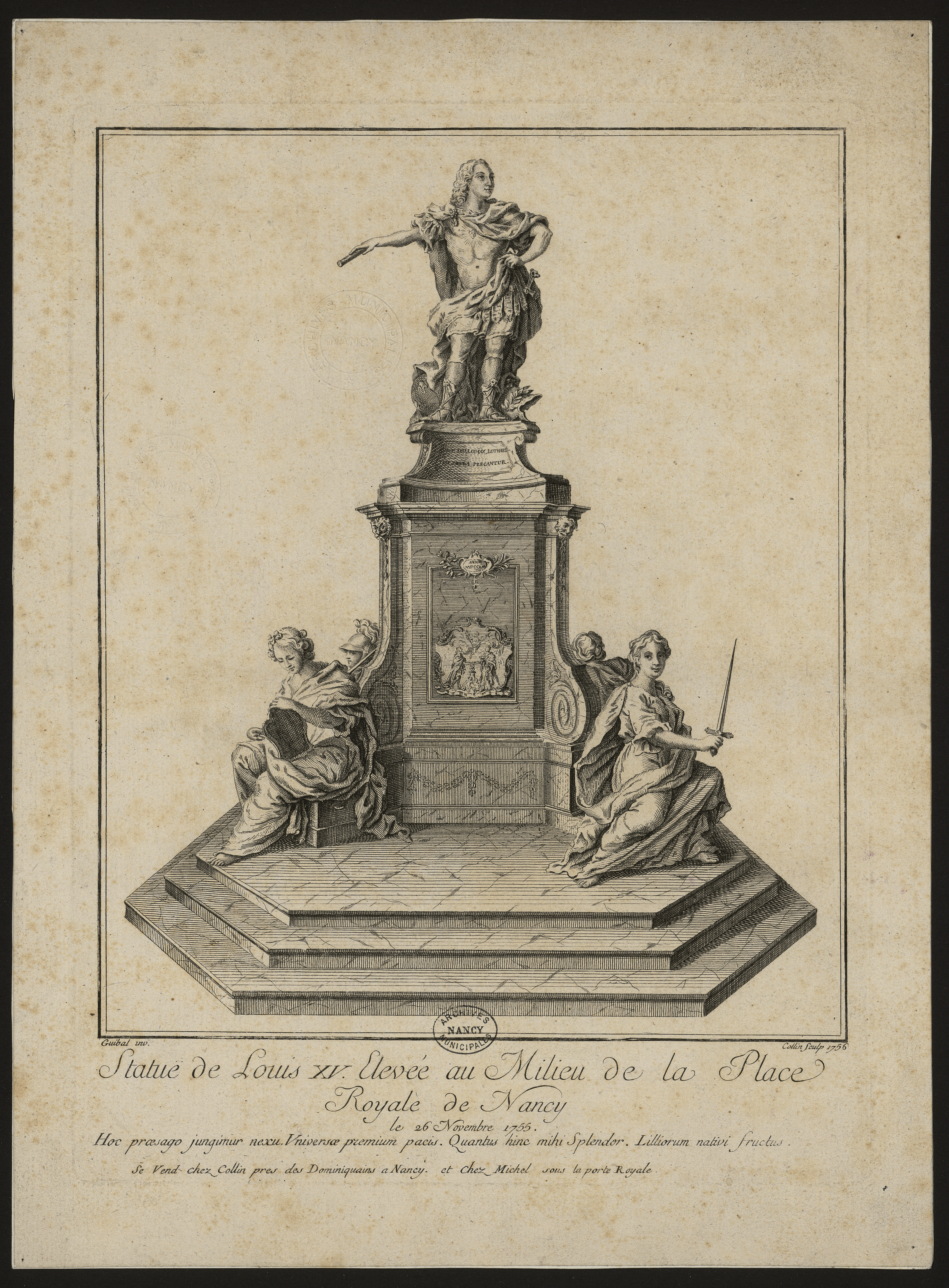 Statue de Louis XV, place Royale Détruite en 1792, cette statue de Barthélemy Guibal et Paul-Louis Cyfflé s'élevait à l'emplacement de l'actuelle statue de Stanislas